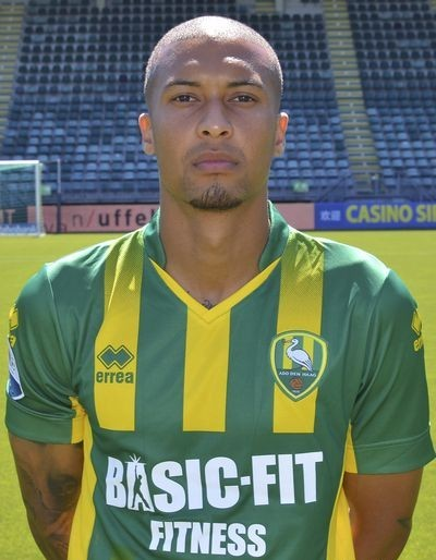 Gianni Zuiverloon